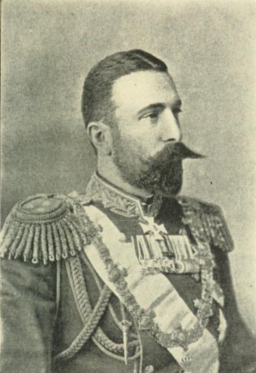 Alejandro I de Battemberg, príncipe de Bulgaria.